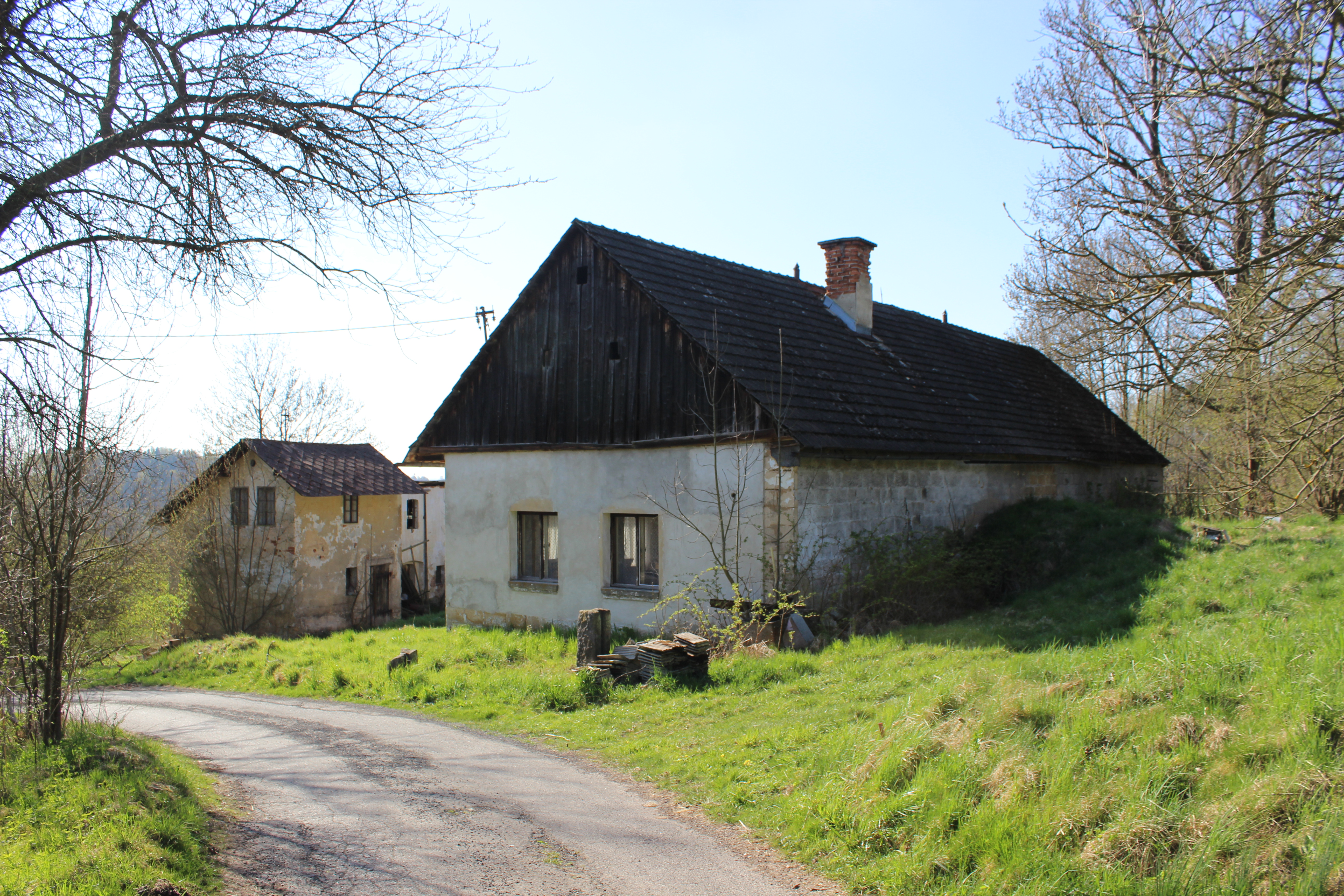 Dům číslo popisné 6 v Hrachovicích, části Mírové pod Kozákovem.